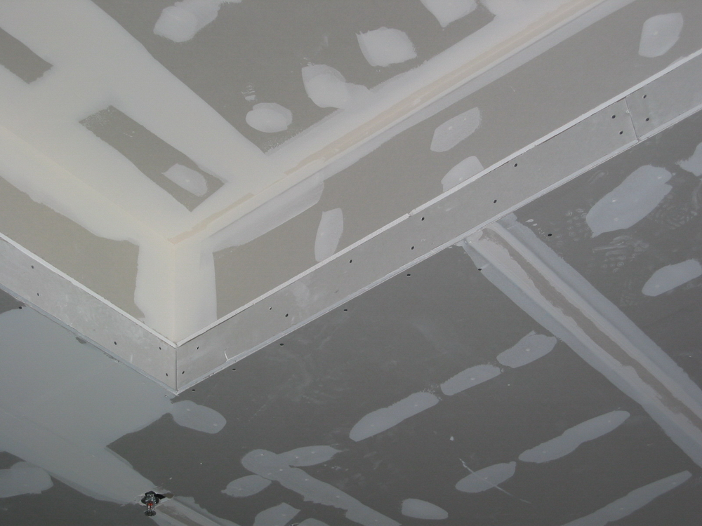 Verschraubte Gipskartonplatten an einer Decke, zum Teil verspachtelt